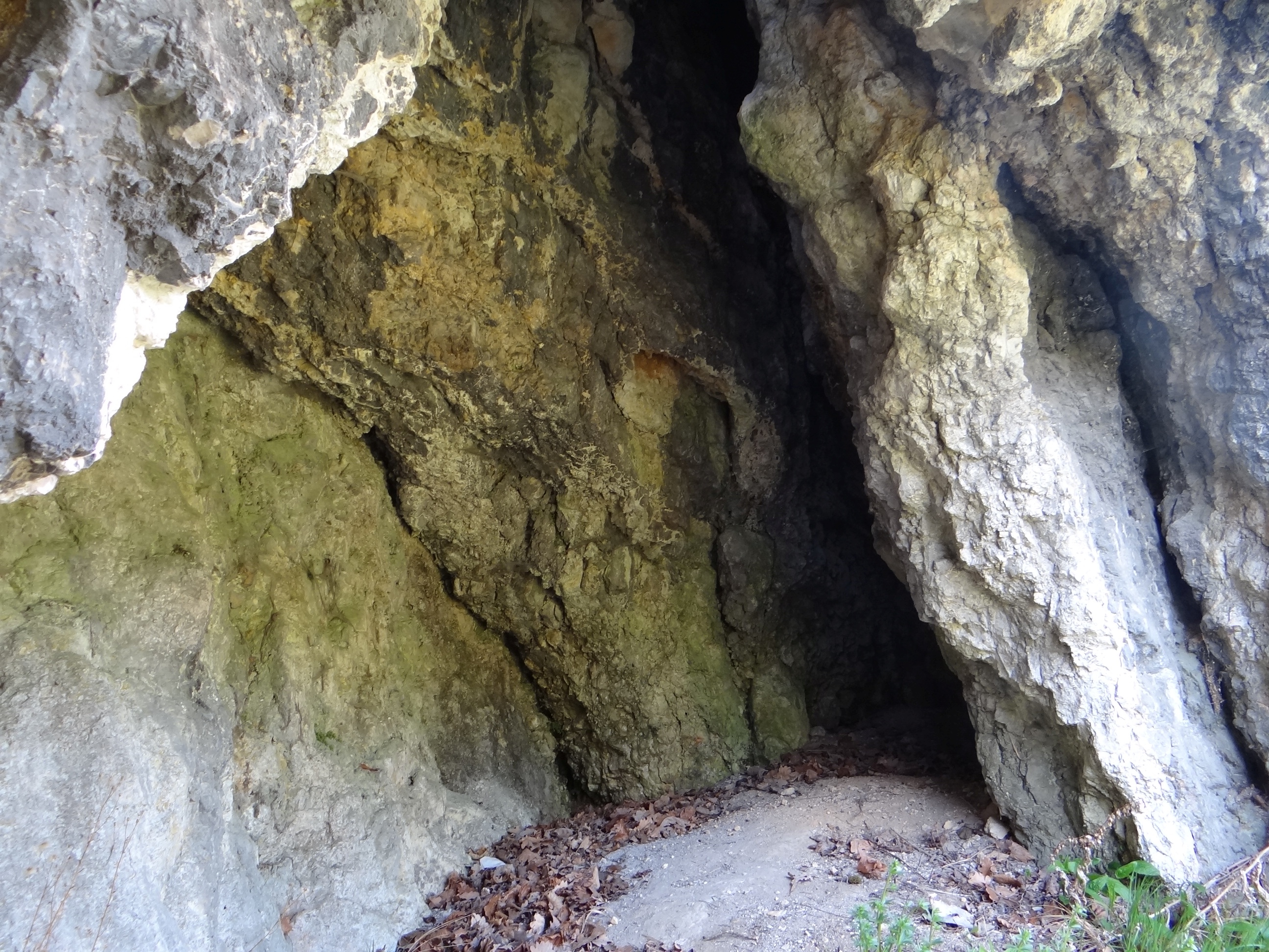 Okno Sokole w Turni z Grotami w Dolinie Bolechowickiej